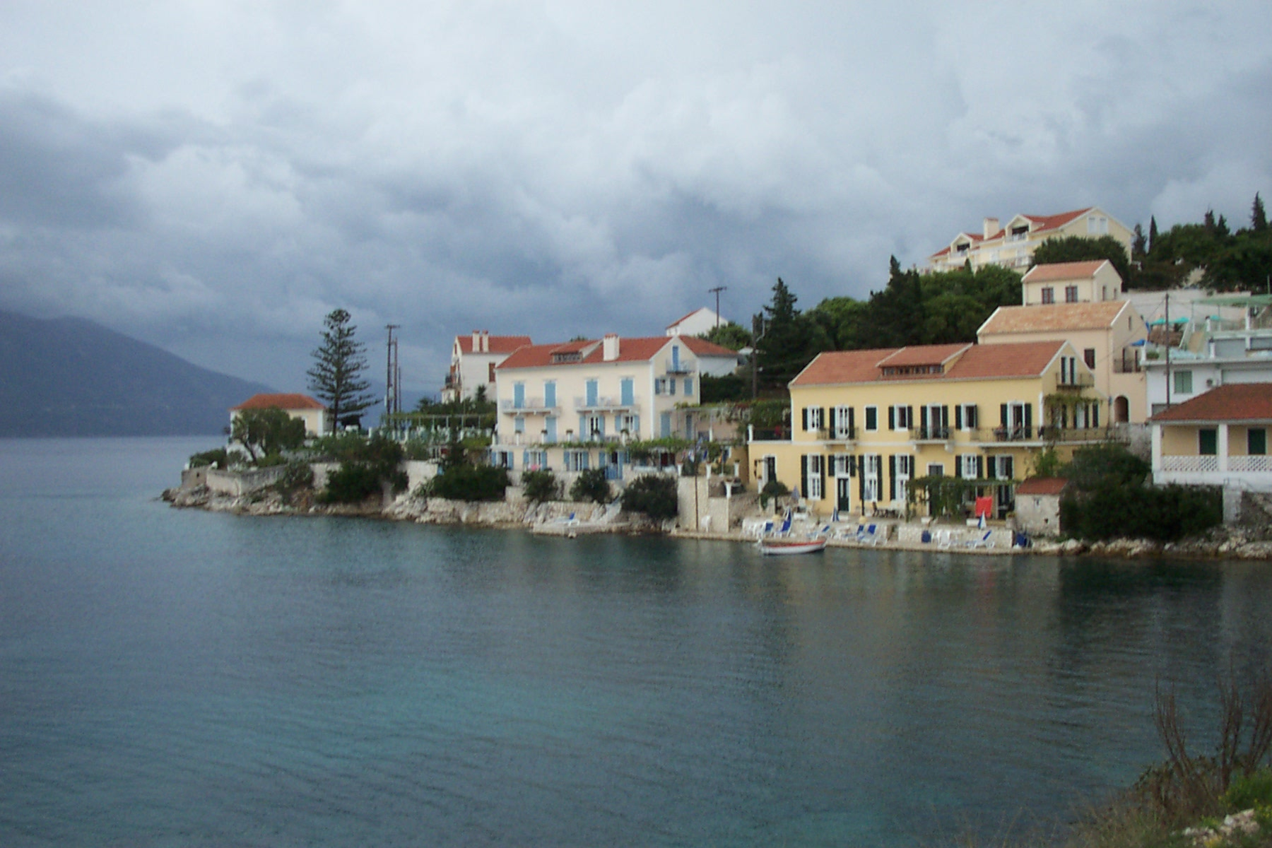 Fiscardo, Kefalonia, Greece